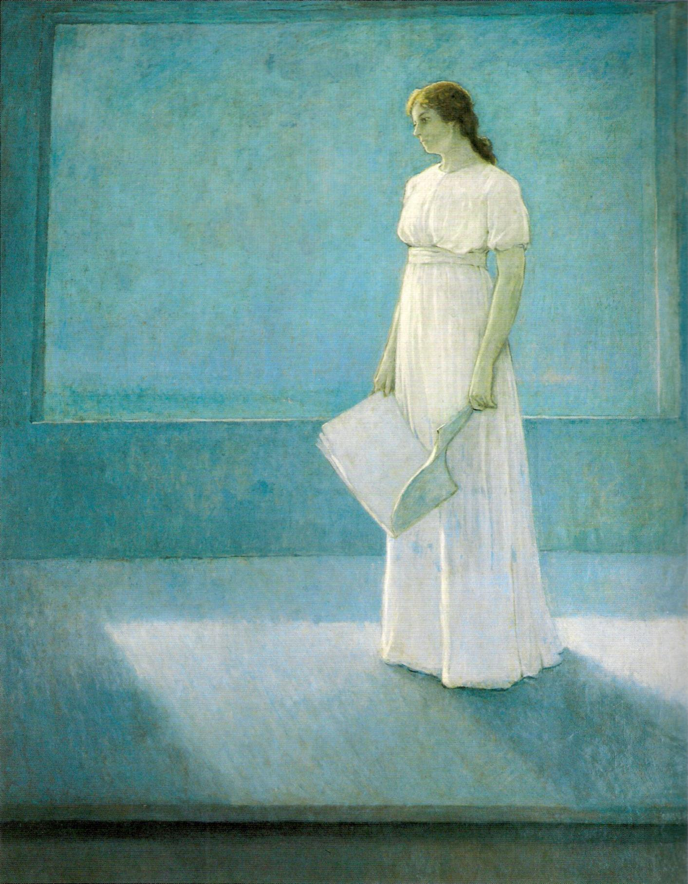 La literatura, (1905) Julio Romero de Torres. Pintura sobre mural. Perteneciente al Círculo de la Amistad, Córdoba (España).